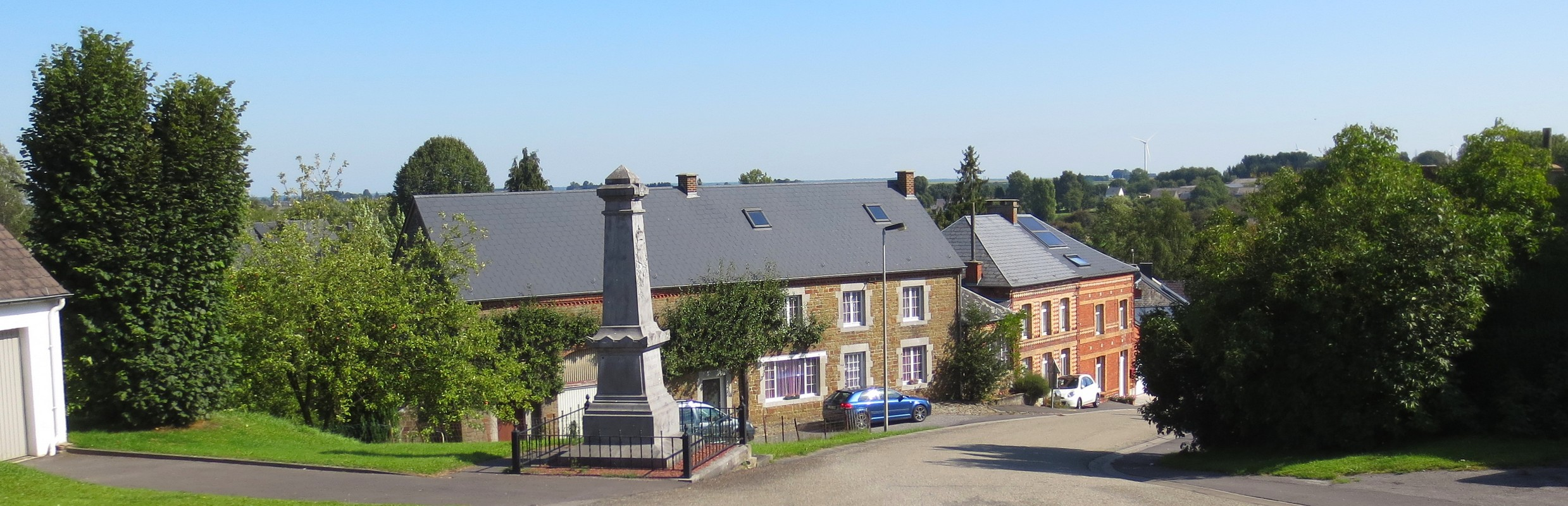 Forges